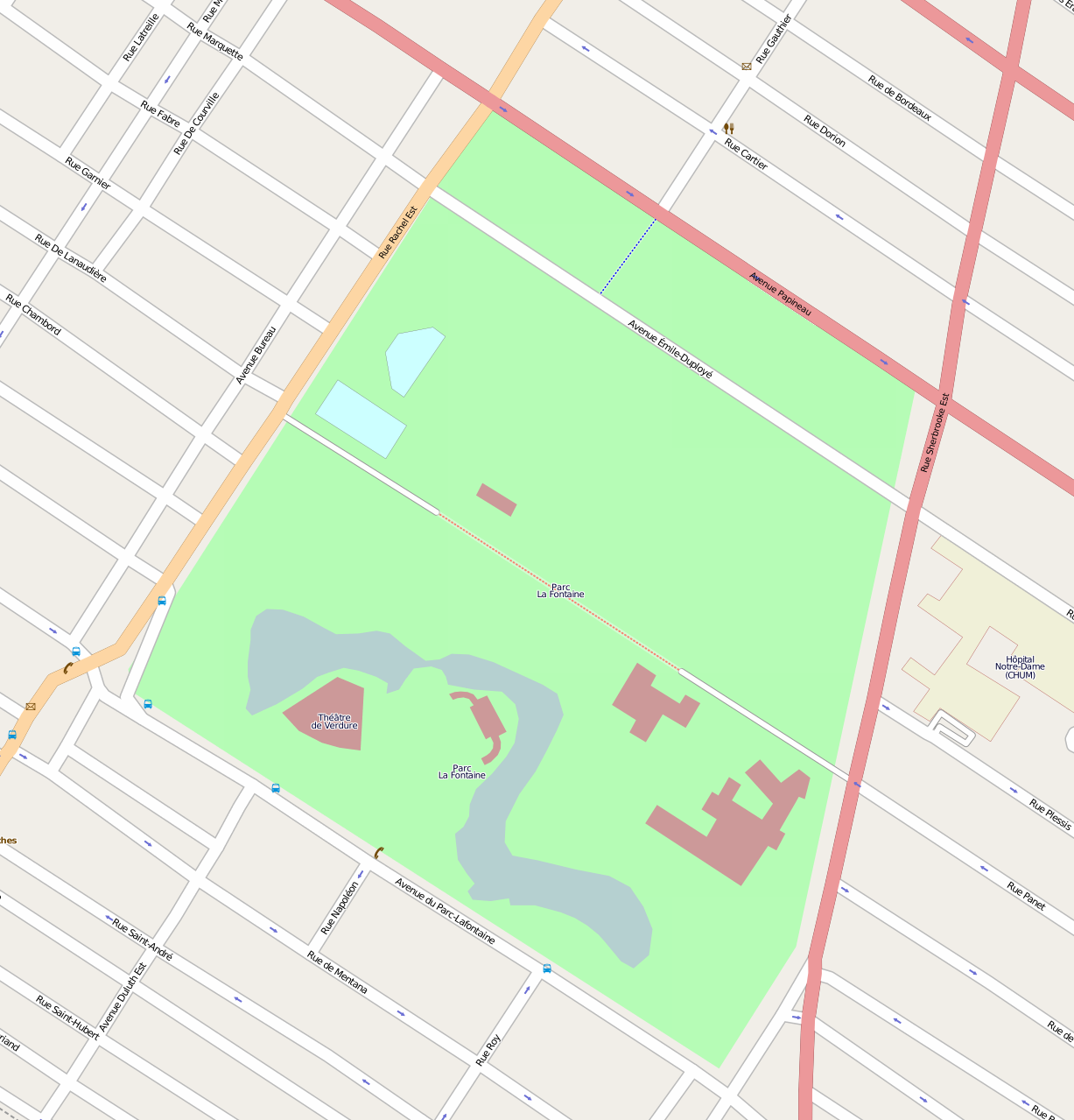 Carte du Parc Lafontaine à Montréal.